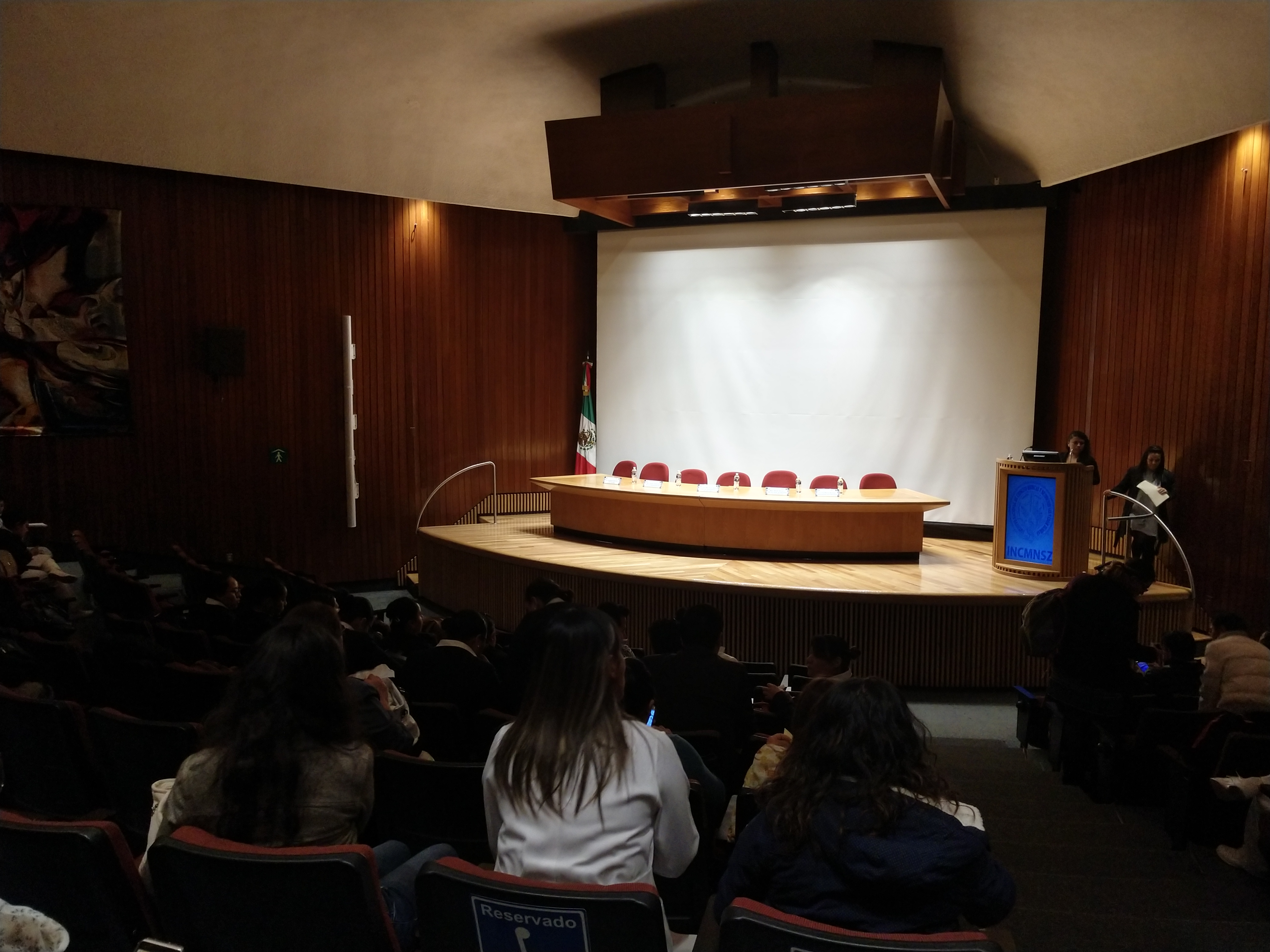 Instalaciones del Instituto Nacional de Ciencias Médicas y Nutrición Salvador Zubirán, Ciudad de México